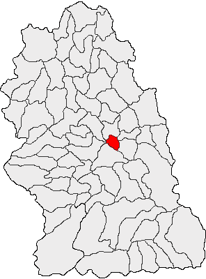 Categorie:Hărţi ale judeţului Hunedoara